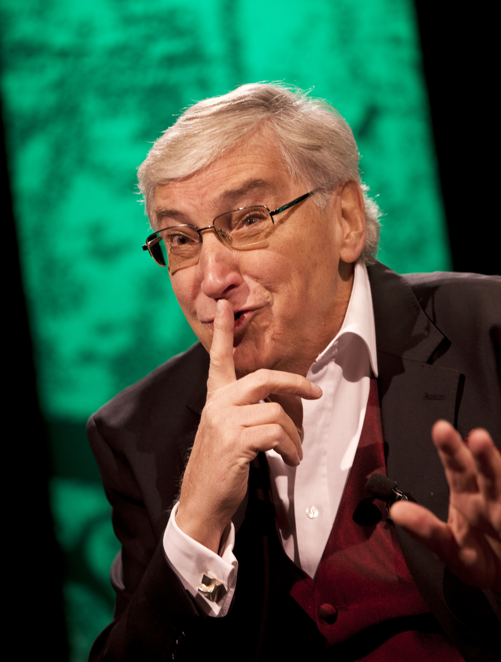 Magnus Härenstem under föreställningen Morsning & goodbye, 2012.